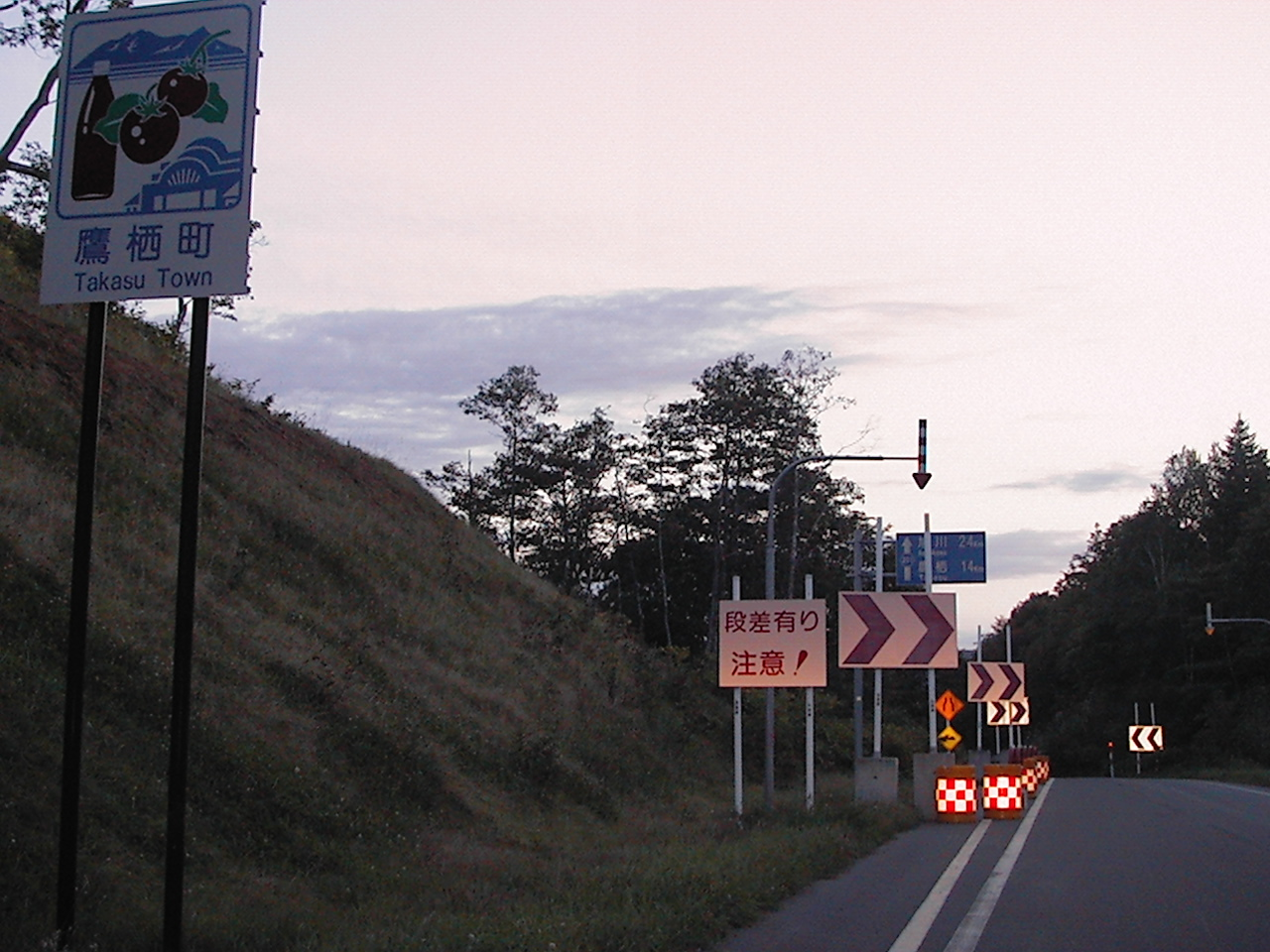 維文峠（鷹栖町カントリーサイン）。